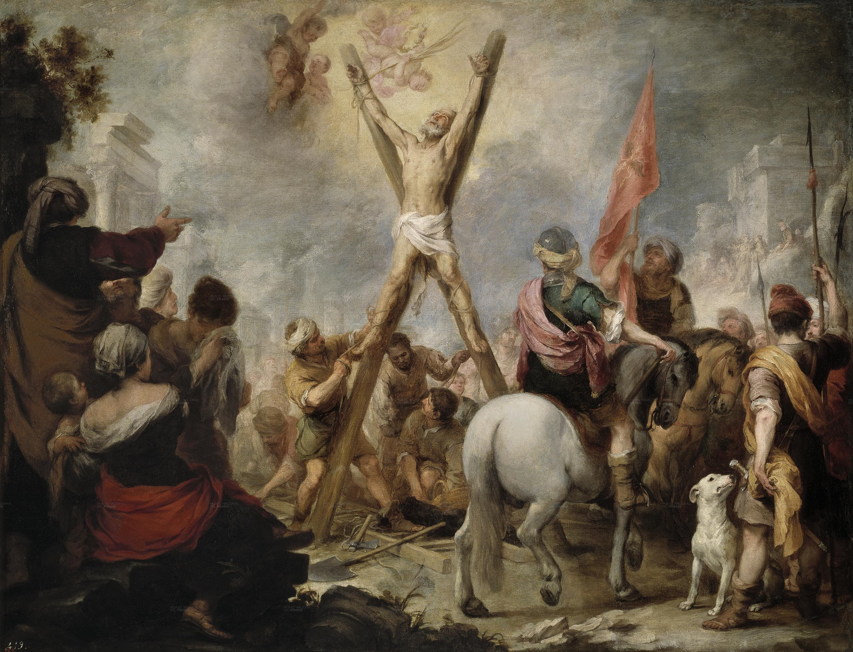 La obra representa el martirio del apóstol San Andrés, que según la tradición murió crucificado, al igual que su hermano San Pedro, el primer papa de la Iglesia Católica.